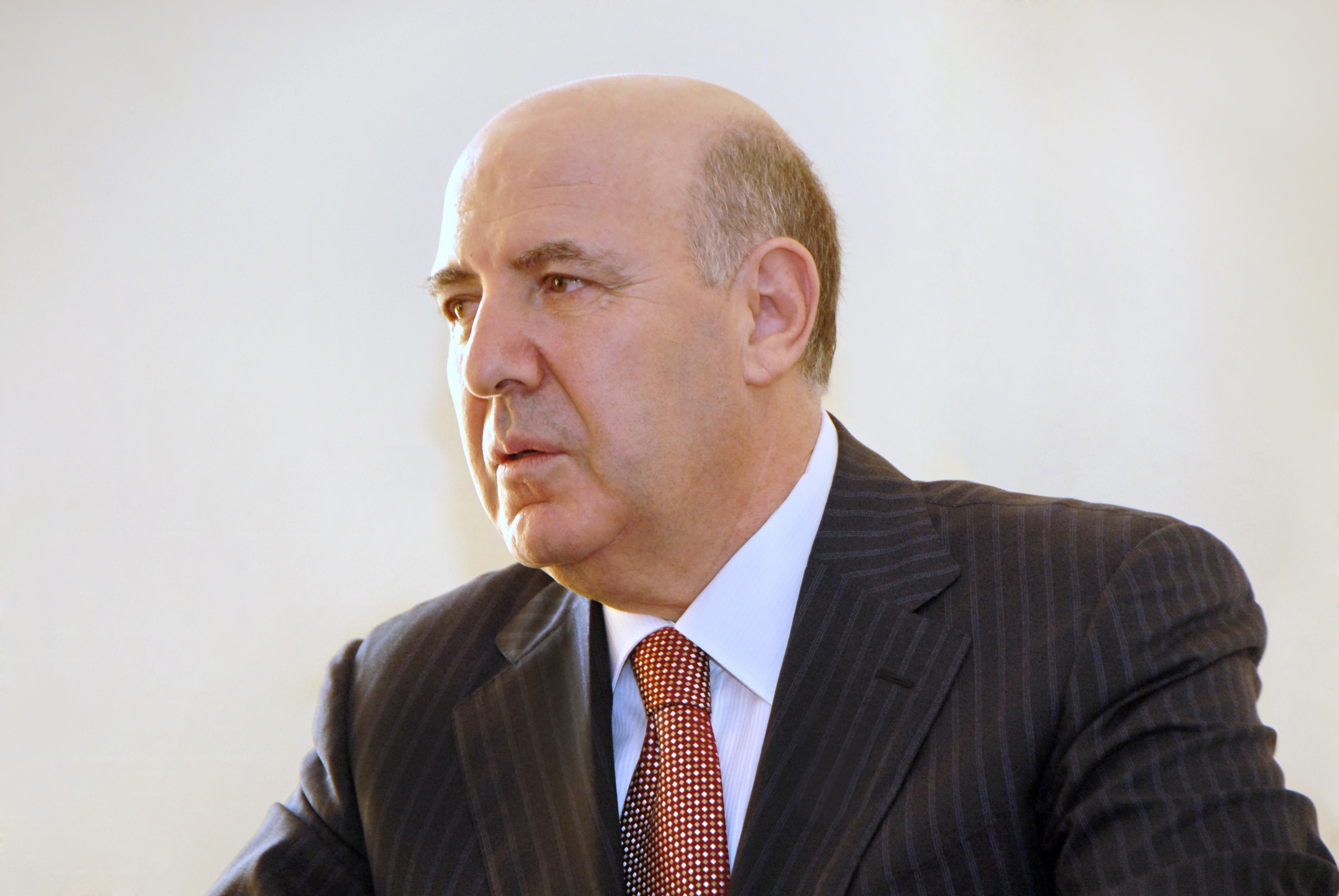 Əmiraslanov Əhliman Tapdıq oğlu ( 17 noyabr 1947, Zod, Basarkeçər rayonu, Ermənistan SSR) — Azərbaycan Tibb Universitetinin rektoru, tibb elmləri doktoru, professor, AMEA-nın və Polşa Tibb Elmləri Akademiyasının həqiqi, Rusiya Elmlər Akademiyasının xarici üzvü, AMEA-nın Biologiya və Tibb Elmləri Bölməsinin akademik-katibi, SSRİ Dövlət Mükafatı laureatı, Milli Məclisin deputatı, cərrah-onkoloq, əməkdar elm xadimi. Azərbaycan Tibb Universiteti onkologiya kafedrasının müdiri; Azərbaycan Respublikasının Prezidenti yanında Elmin İnkişafı Fondu və Bilik Fondunun Himayəçilik Şurasının üzvü (18 iyul 2014-cü ildən)